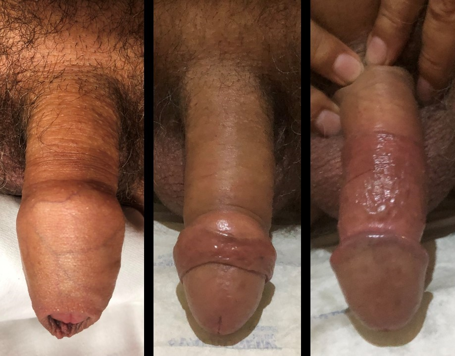 Prepucio en pene erecto de adulto sano, intacto, mostrando su elasticidad en 3 fases del prepucio, figurando 3 condiciones durante el coito y masturbación. Varón de 60 años de edad, con ADN con estimado étnico 33% español, 28% portugués, 10% francés, 21% indígena americano y 8% de otros.